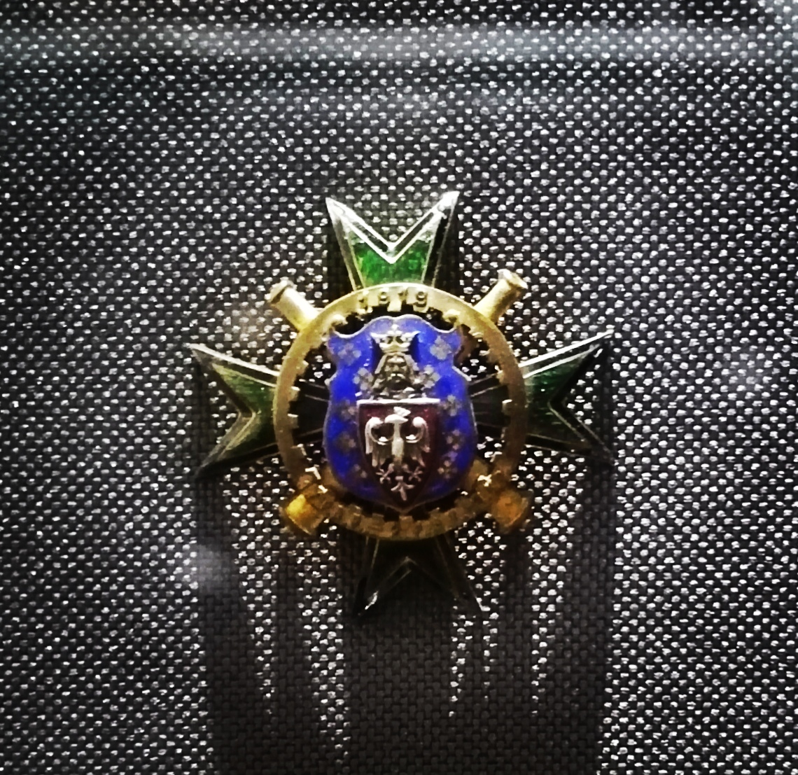 Odznaka 17 pułk artylerii polowej w Muzeum Początków Państwa Polskiego w Gnieźnie.